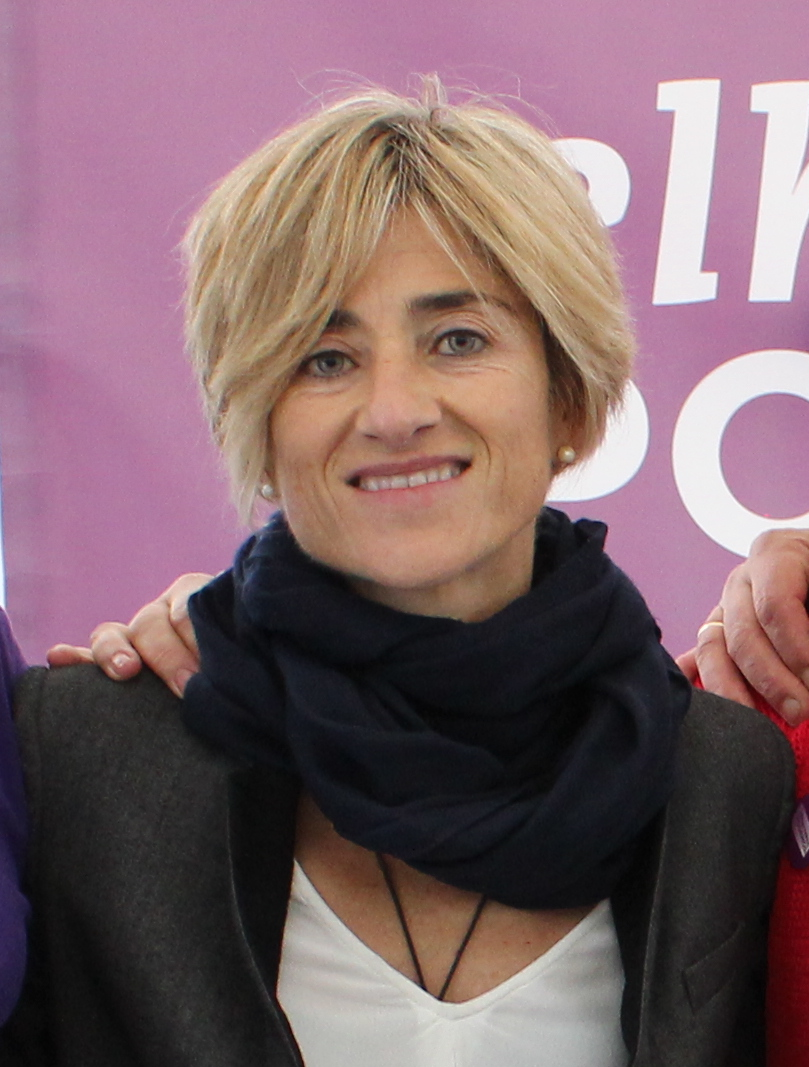 2016_LAUDIO_HAUTESKUNDEAK_ELKARREKIN AHAL DUGU